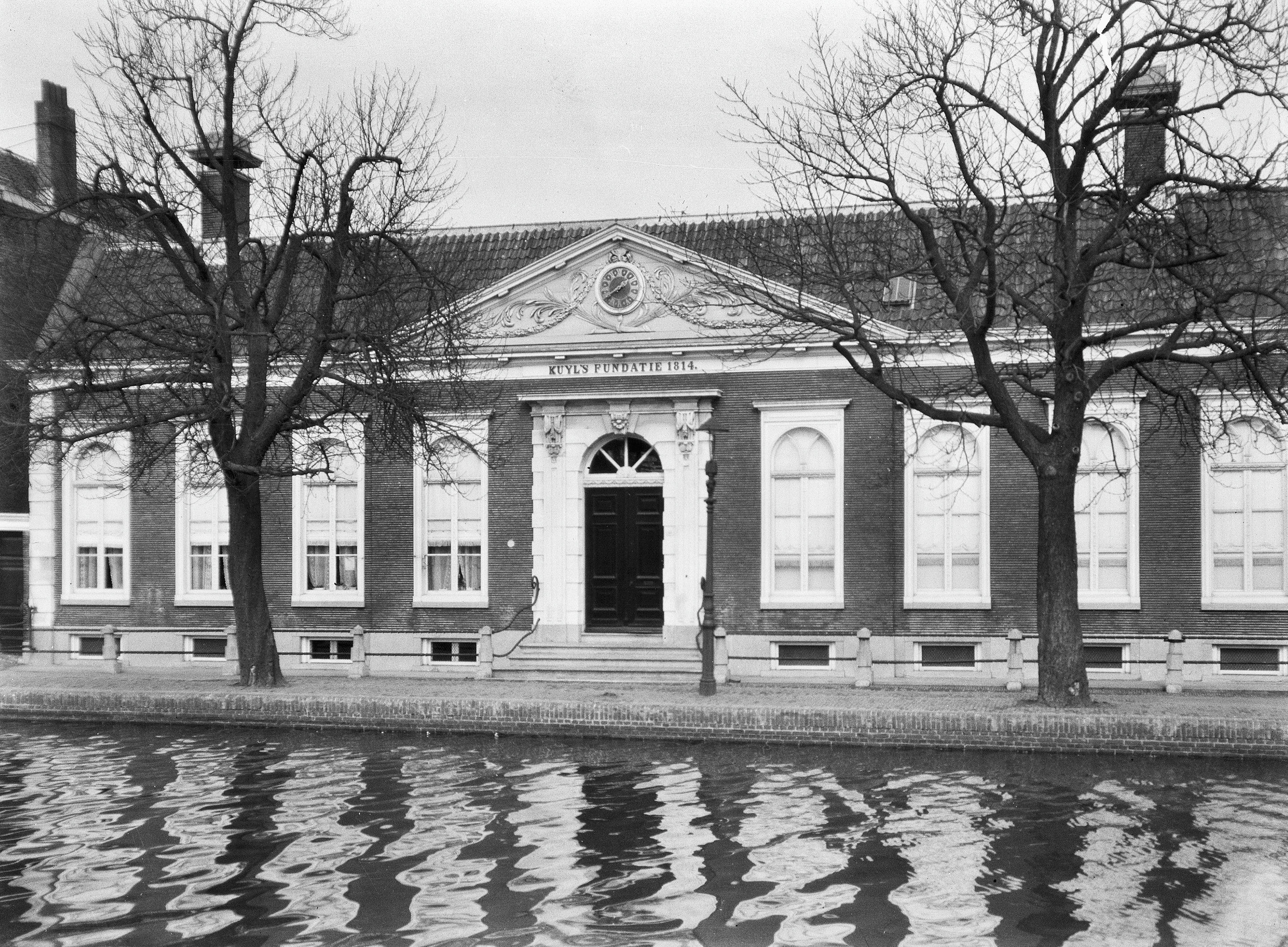 Kuylsfundatie: Schiekade 54, voorgevel